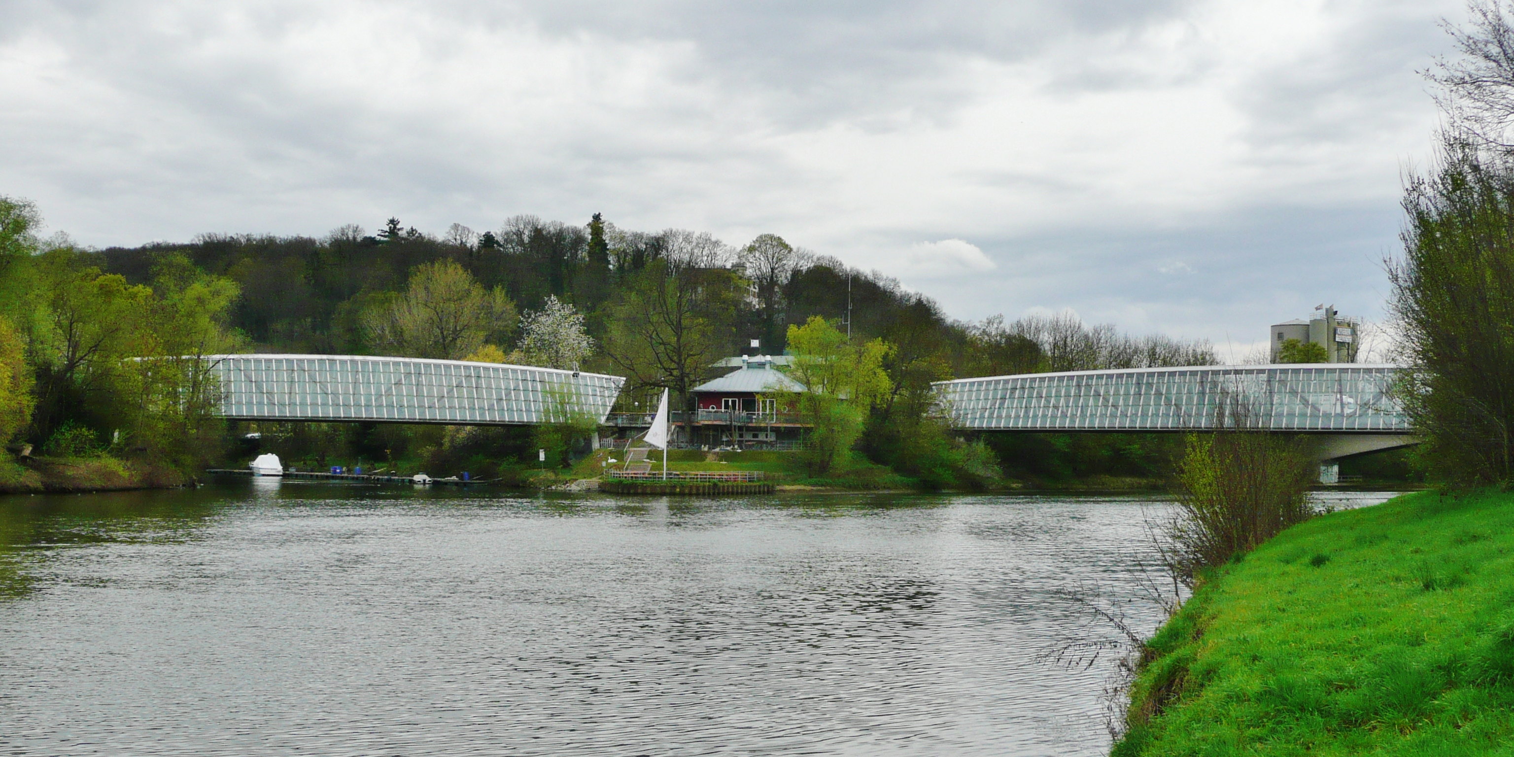 Der Fluss Rems mündet in den Neckar in Remseck